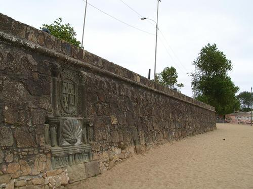 Fuerte la planchada, Penco. This is a photo of a national monument in Chile: 653